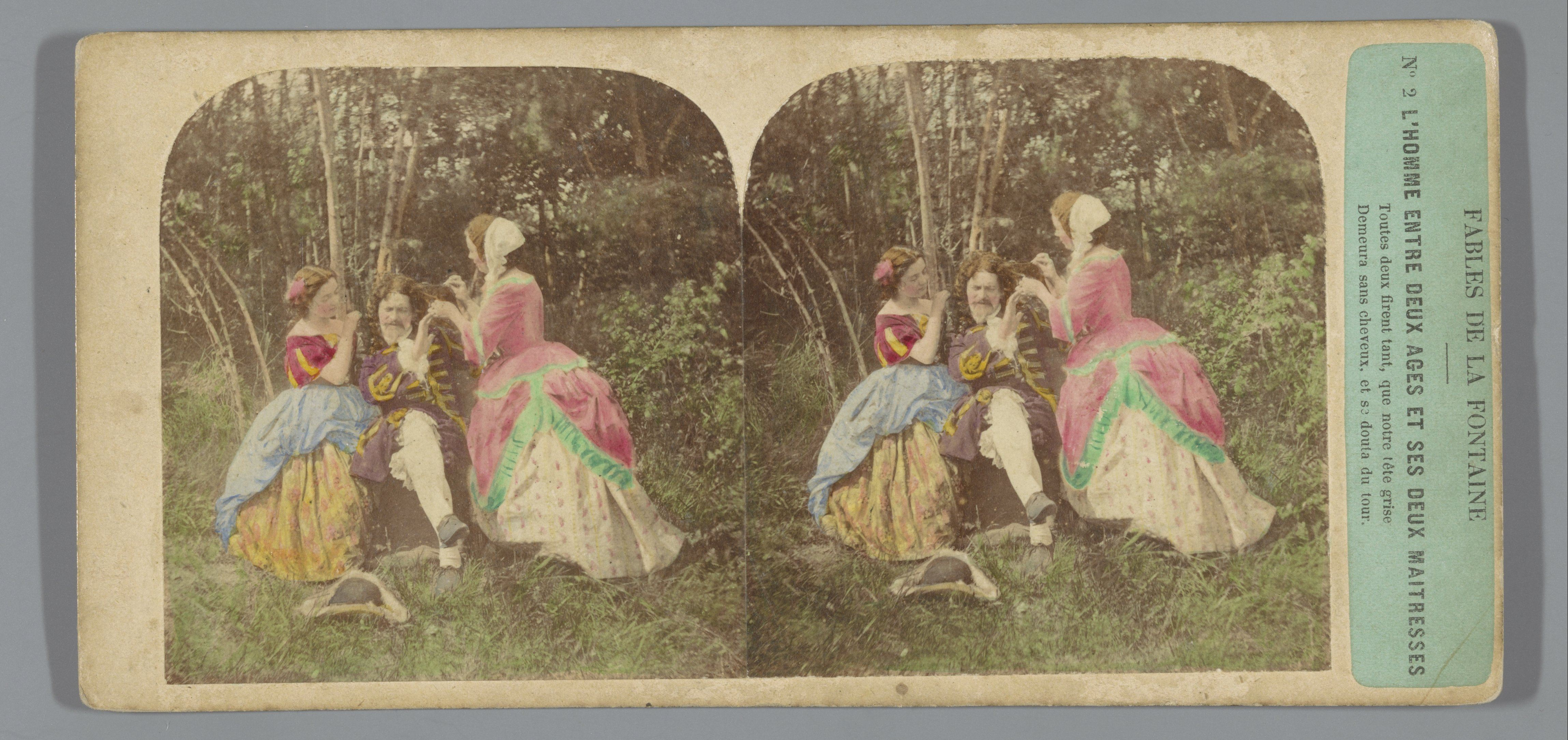 IdentificatieTitel(s): Fabel van de man en zijn twee minnaressen van Jean de La FontaineL'Homme entre deux âges et ses deux maîtresses (titel op object)Fables de la Fontaine (serietitel op object)Objecttype: stereofoto Objectnummer: RP-F-F10816Opschriften / Merken: nummer, recto, geplakt: ‘No. 2’opschrift, recto, geplakt: ‘Toutes deux firent tant, que notre tête grise/ Demeura sans cheveux, et se douta du tour.’opschrift, verso rechtsboven, handgeschreven: ‘P’opschrift, verso rechtsonder, handgeschreven: ‘132’Omschrijving: Voorstelling van de fabel van de la Fontaine, gebaseerd op de fabels van Aesop.VervaardigingVervaardiger: fotograaf: anoniemuitgever: Furne Fils & H. TournierPlaats vervaardiging: FrankrijkDatering: 1858Materiaal: karton fotopapier Techniek: albuminedruk / met de hand kleurenAfmetingen: secundaire drager: h 84 mm × b 176 mmOnderwerpWat: fabels van Esopus: Gebruik 85 (...)Verwerving en rechtenVerwerving: overdracht van beheer 1994Copyright: Publiek domein